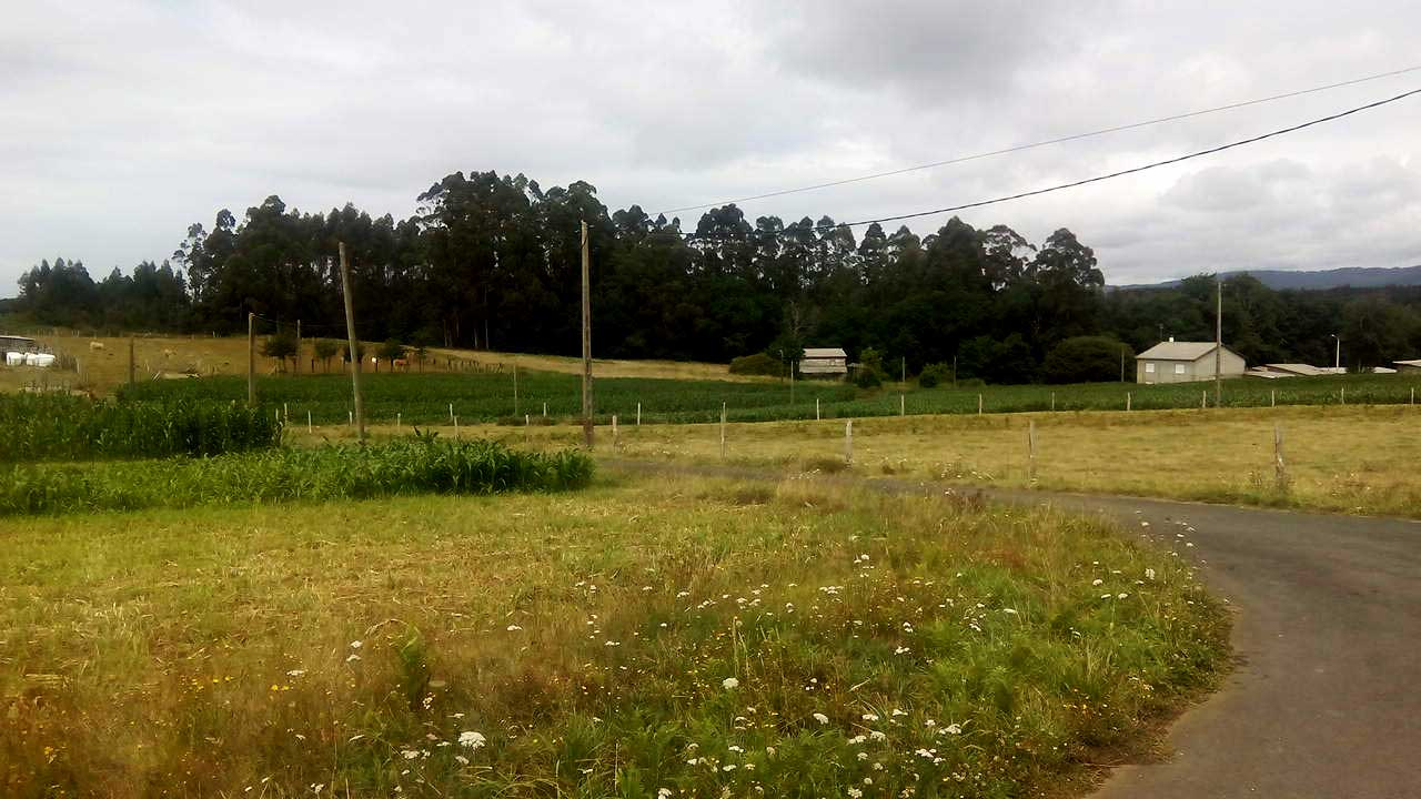 Vista das Filgueiras, O Val.